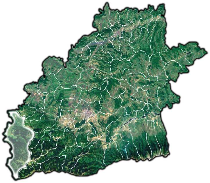 Jina jud Sibiu.